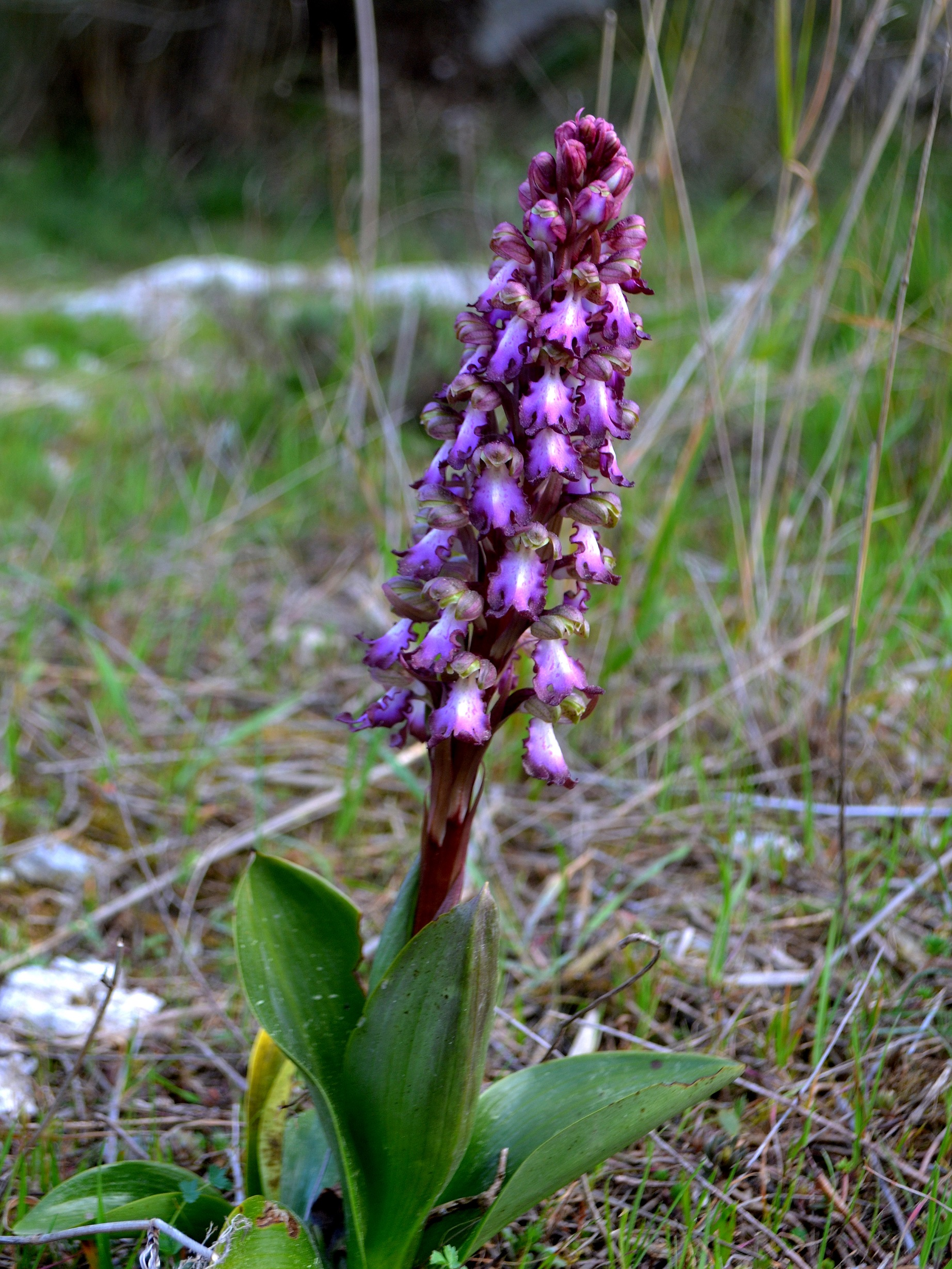 Orquídia, Himantoglossum robertianum, Barlia robertiana, el Penedès